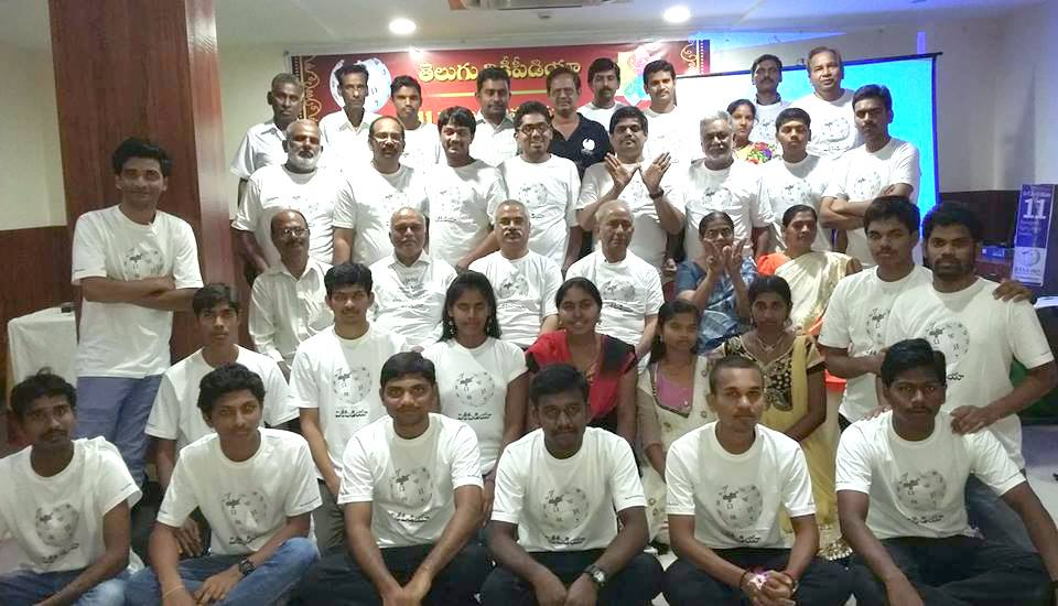 తెవికీ 11వ వార్షికోత్సవాలు